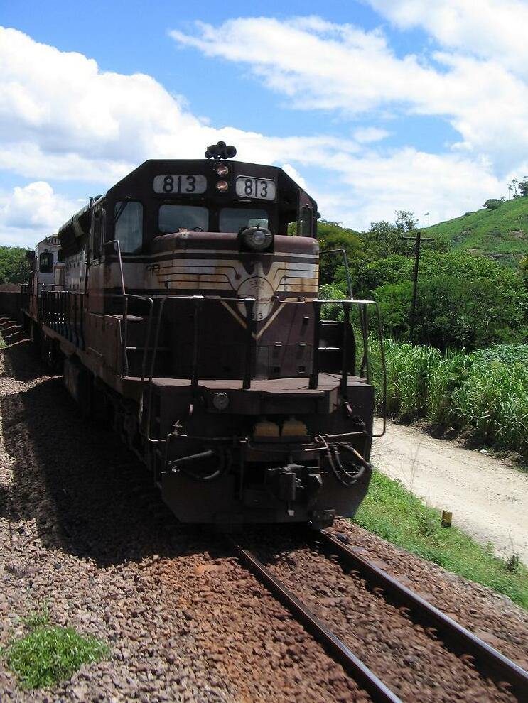 EFVM nº813 DDM45 - 1º Fase - Resplendor-MG-Brasil